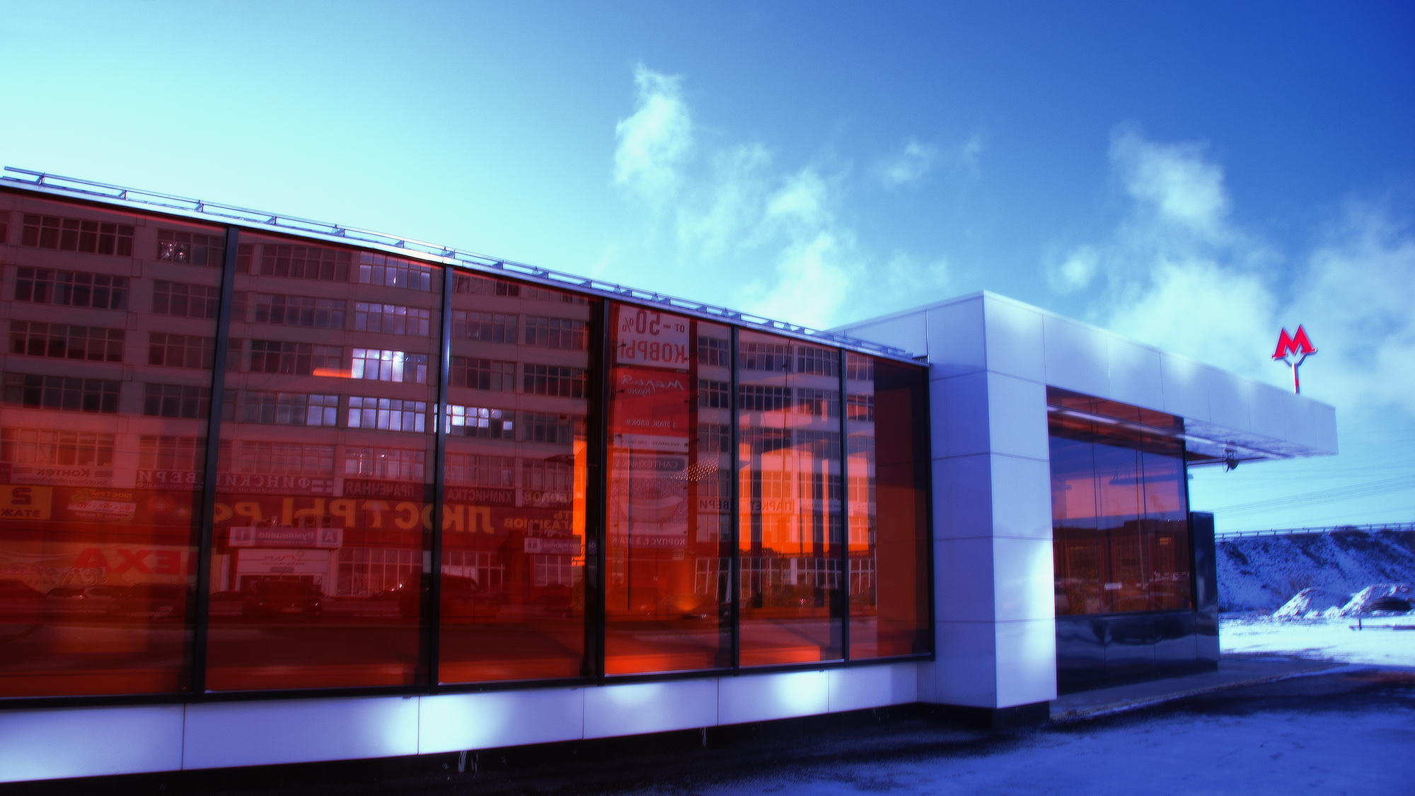 Станция метро «Румянцево» — 199-я станция Московского метрополитена By: Khusen Rustamov (Хусен Рустамов) Copyright © ART.IRBIS Production